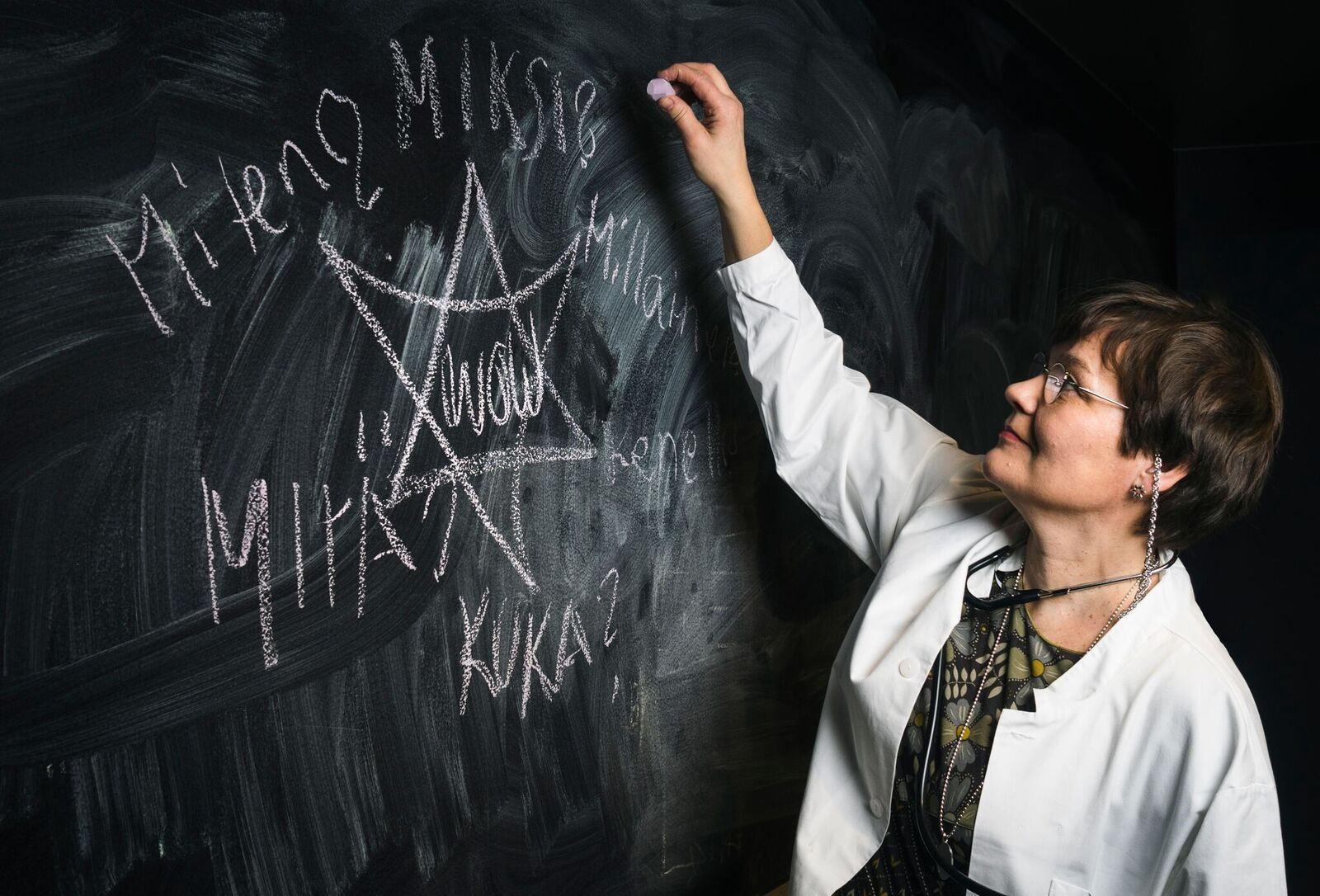 Tapahtumatohtori Helena Wallo